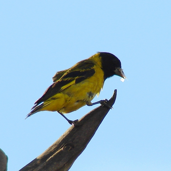 Macho en una rama Description: Hooded siskin male in a branch (Carduelis magellanica) Creator: Luciano Carvalho Date: 21 de enero de 2008 (21-01-2008) Place: Brasil